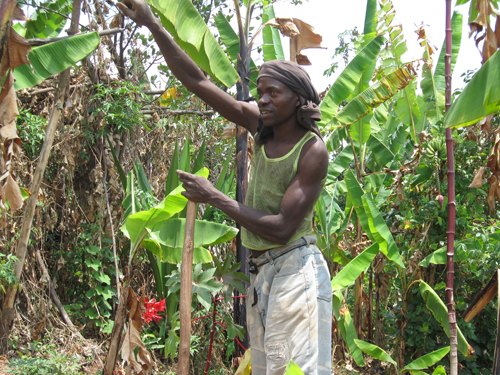 Rulindo farmer